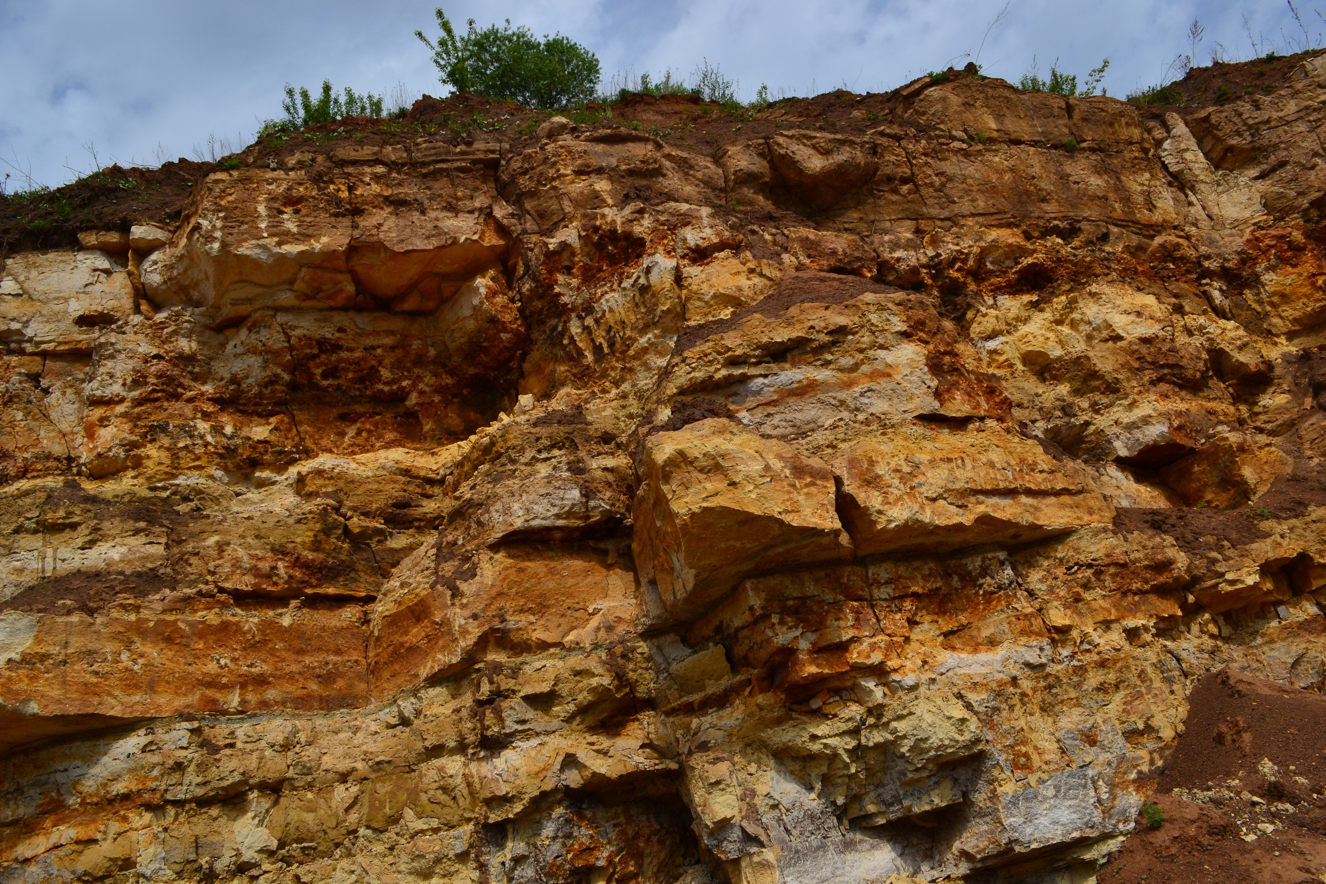 Limestones of the Kasimovian Stage of the Upper Carboniferous